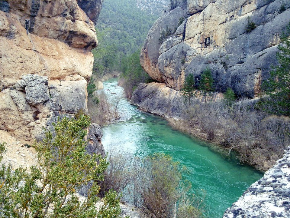 Alto Tajo. Fotos de nuestro viaje con el INEF de Madrid This is a photography of a Site of Community Importance in Spain with the ID: ES4240016. Natura2000 entry, EEA entry